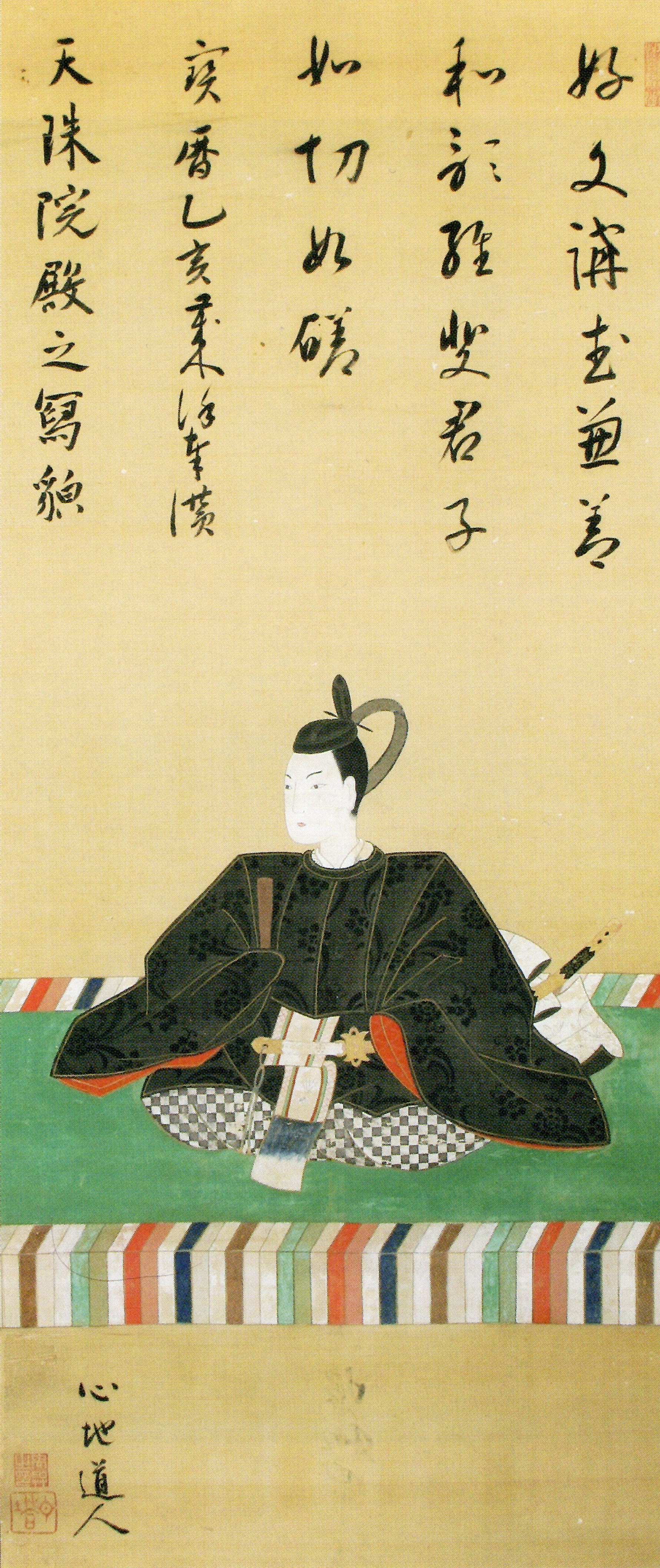 前田重靖の肖像。